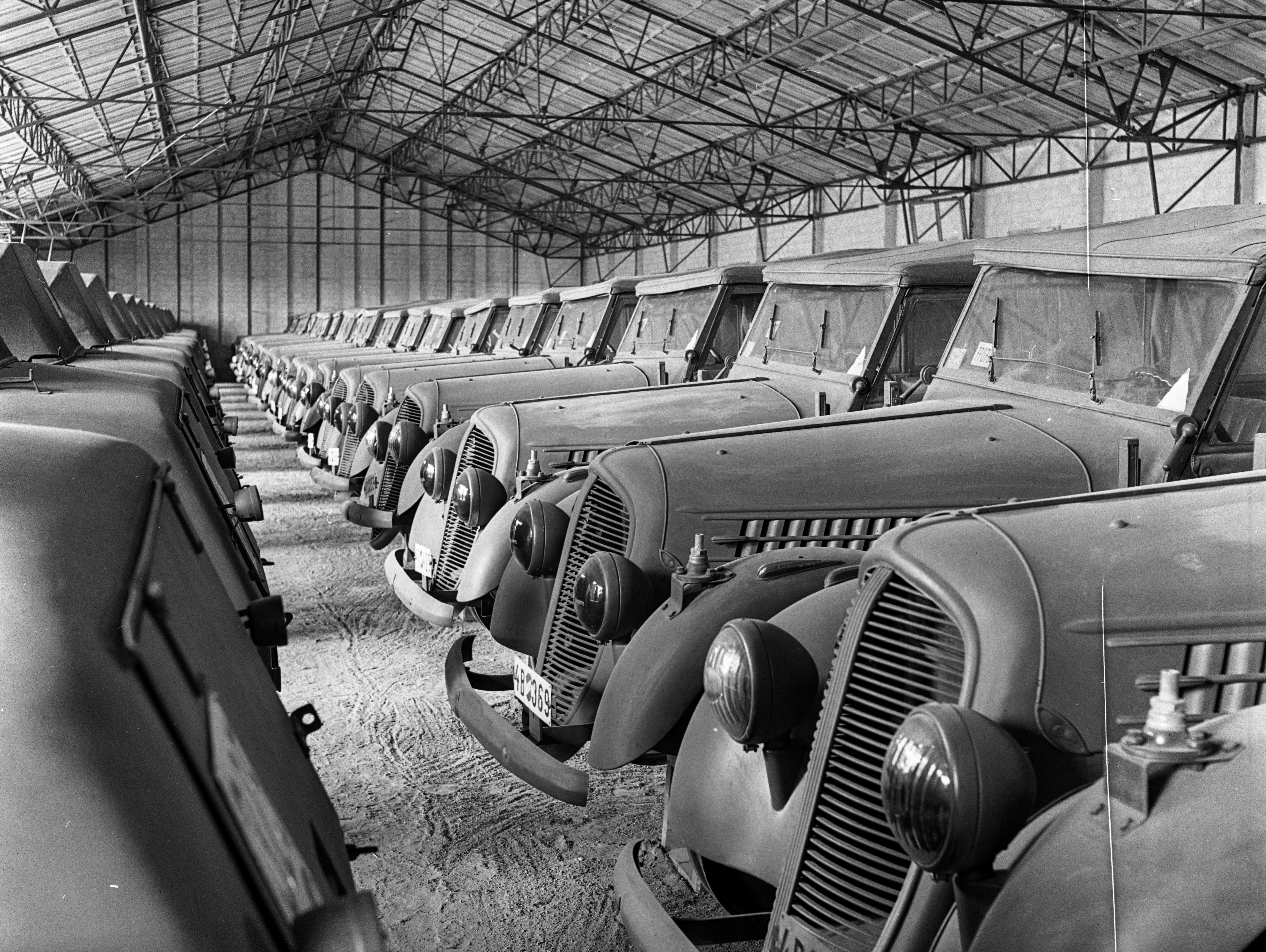 Újszász utca 41-43. Magyar Királyi Honvéd gépkocsiszertár, gépjármű raktár. Location: Hungary, Budapest XVI. Tags: Budapest, automobile, Skoda-brand, Czech brand, military Title: Újszász utca 41-43. Magyar Királyi Honvéd gépkocsiszertár, gépjármű raktár.